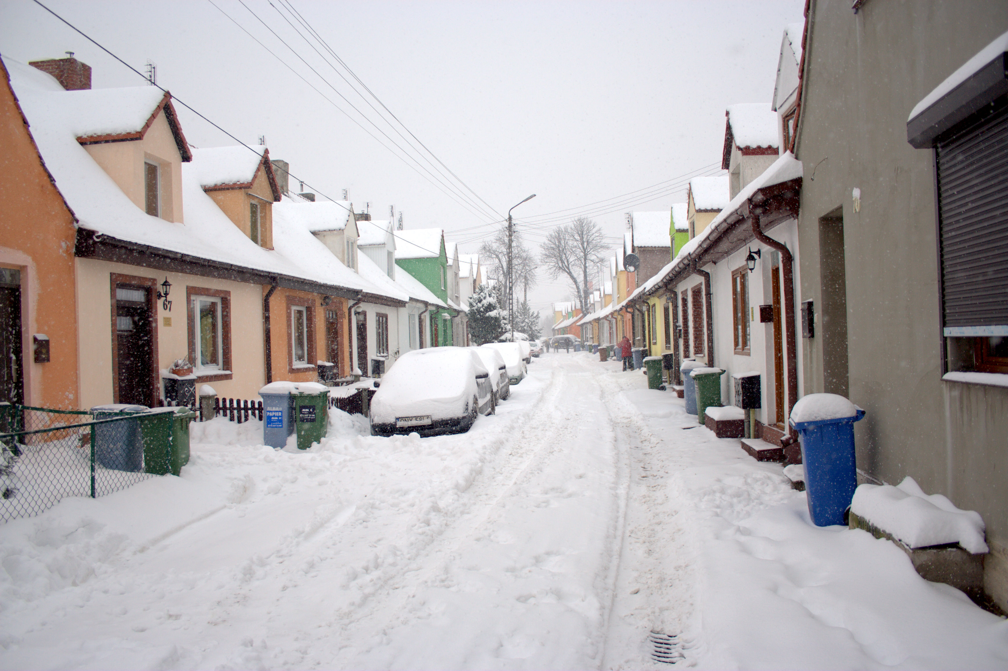 Domki jednorodzinne przy ulicy Kamienieckiej